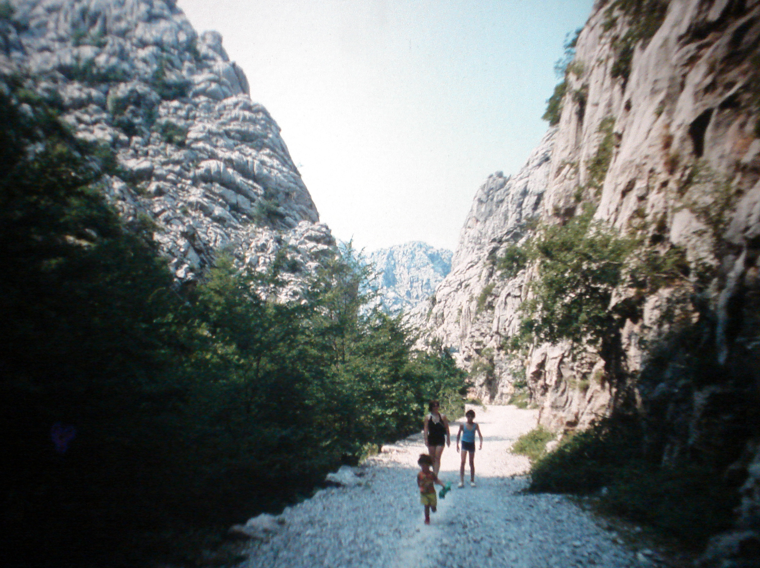 PAKLENICA 1983